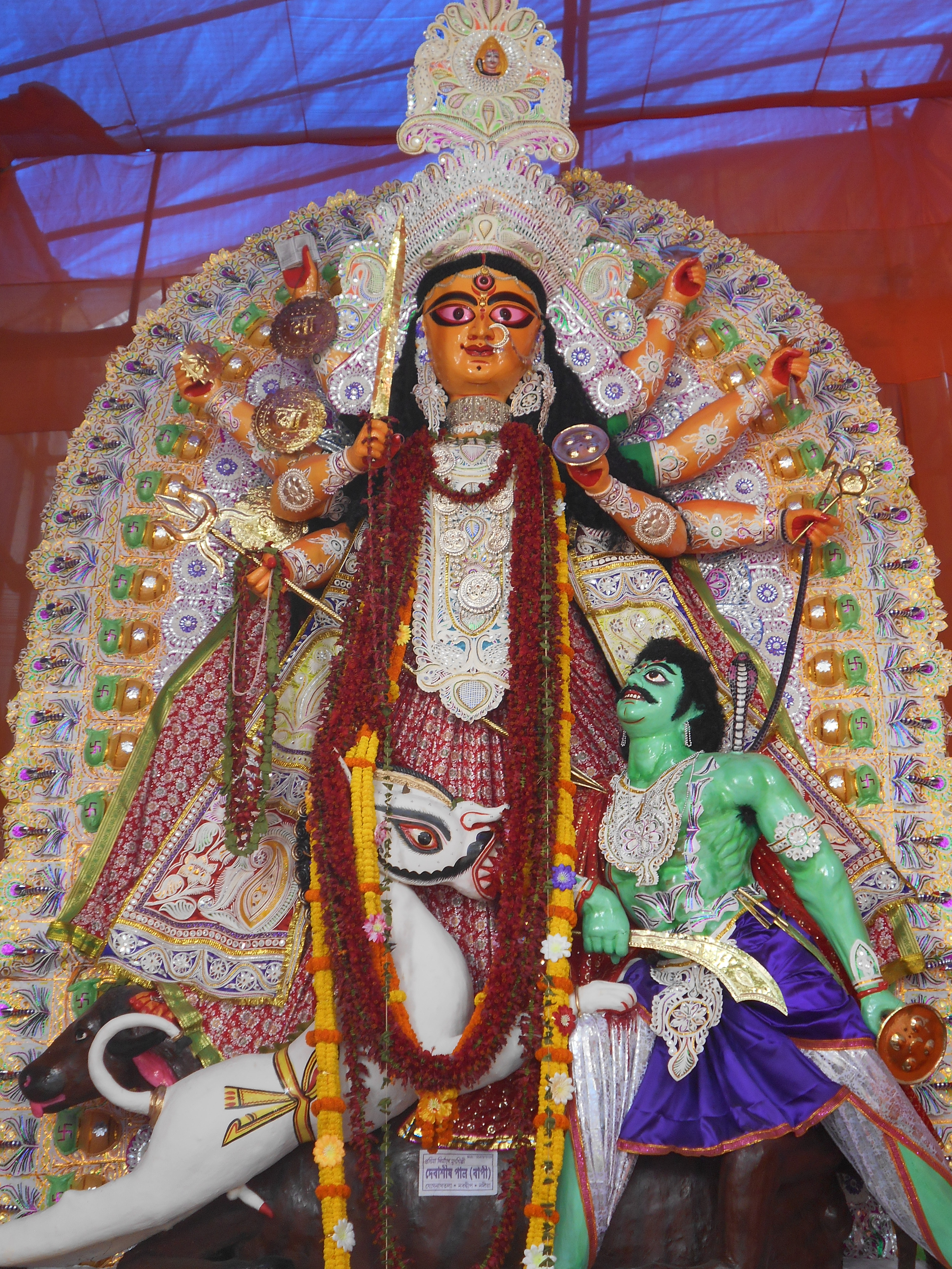 ডুমুরেস্বরী মাতা